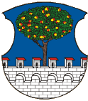 Znak obce Lhenice